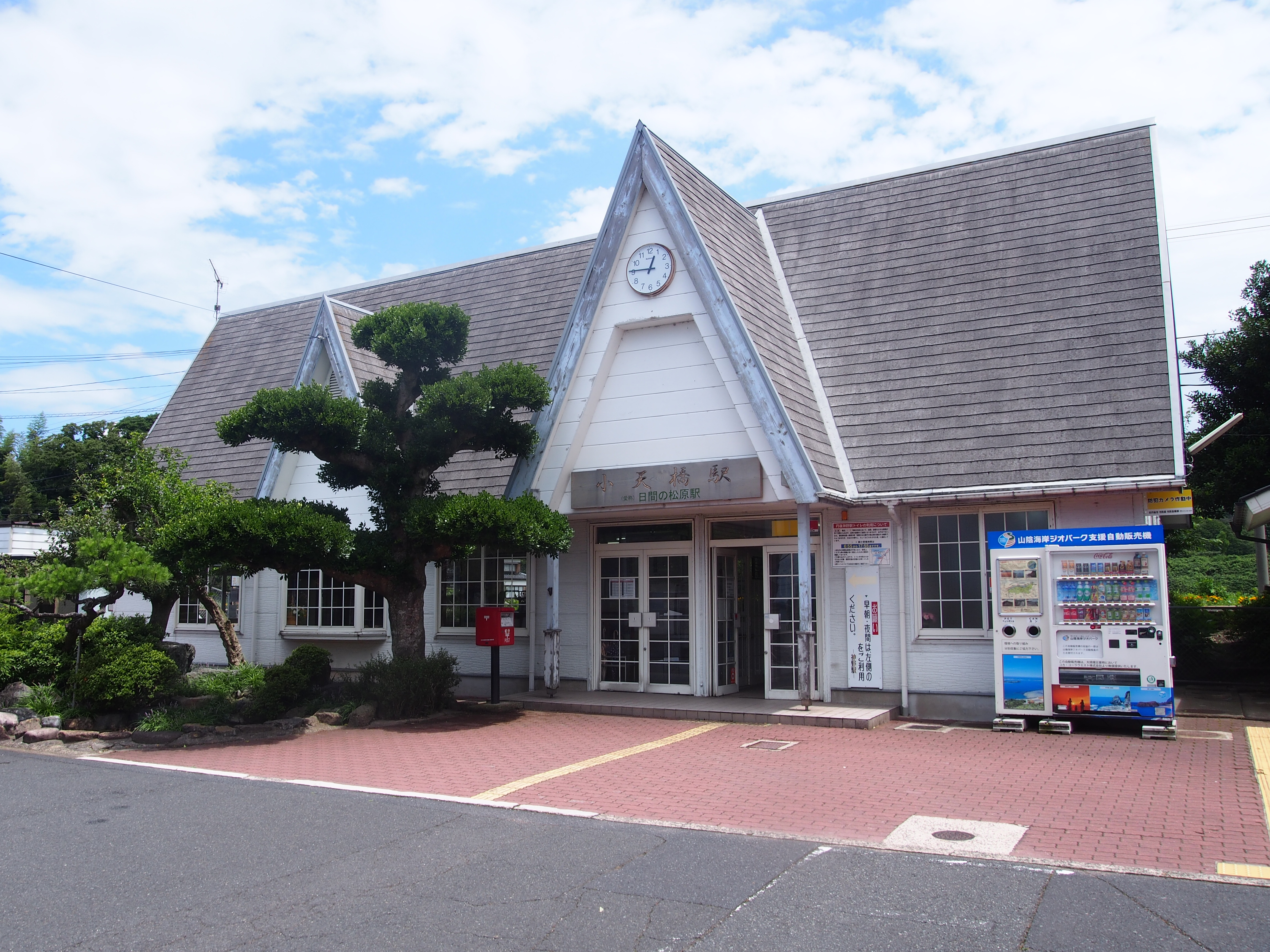 小天橋駅（京都丹後鉄道宮豊線）京都府京丹後市久美浜町浦明 駅舎正面